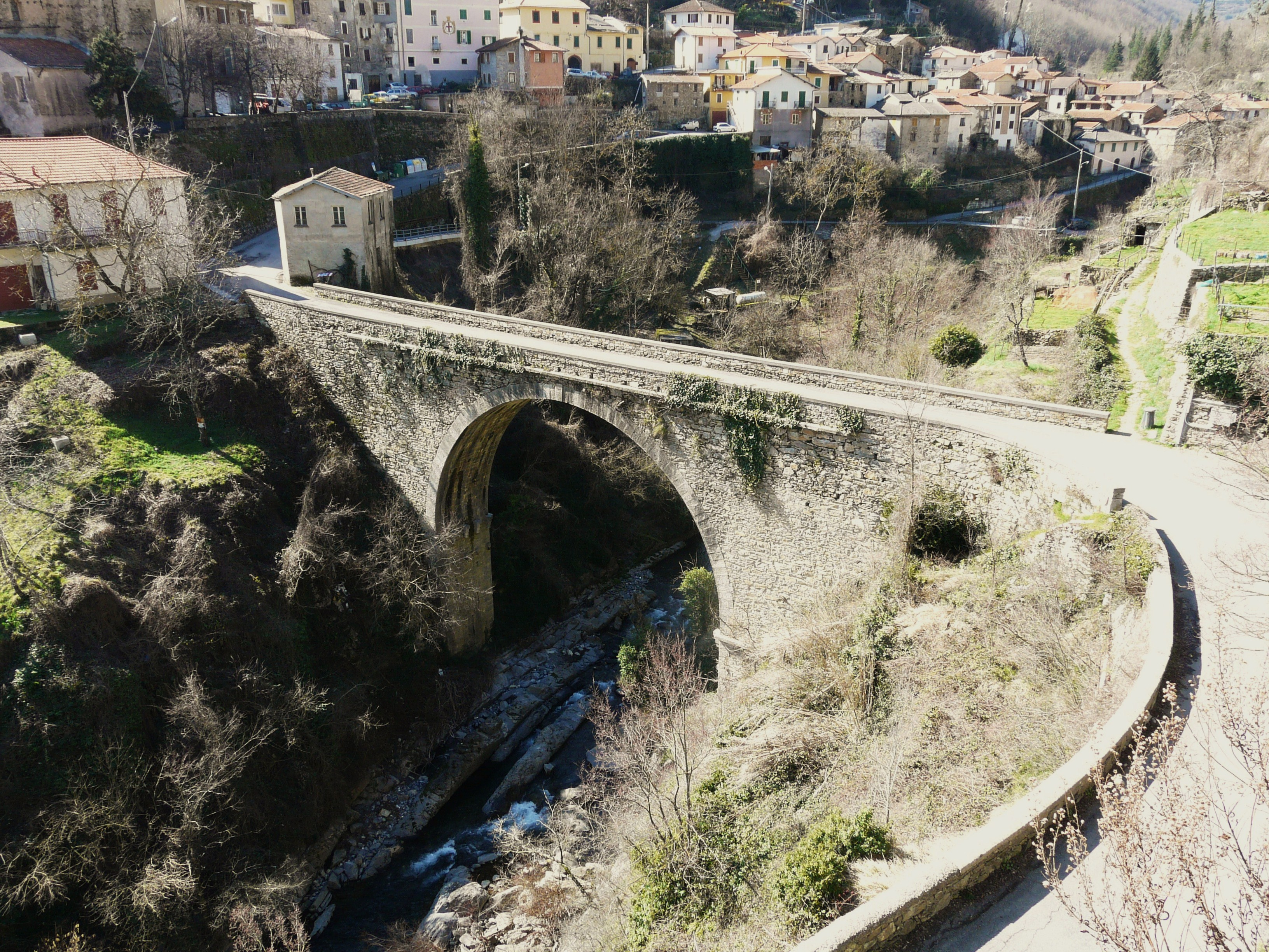 Ponte di Lavina, Rezzo, Liguria, Italia